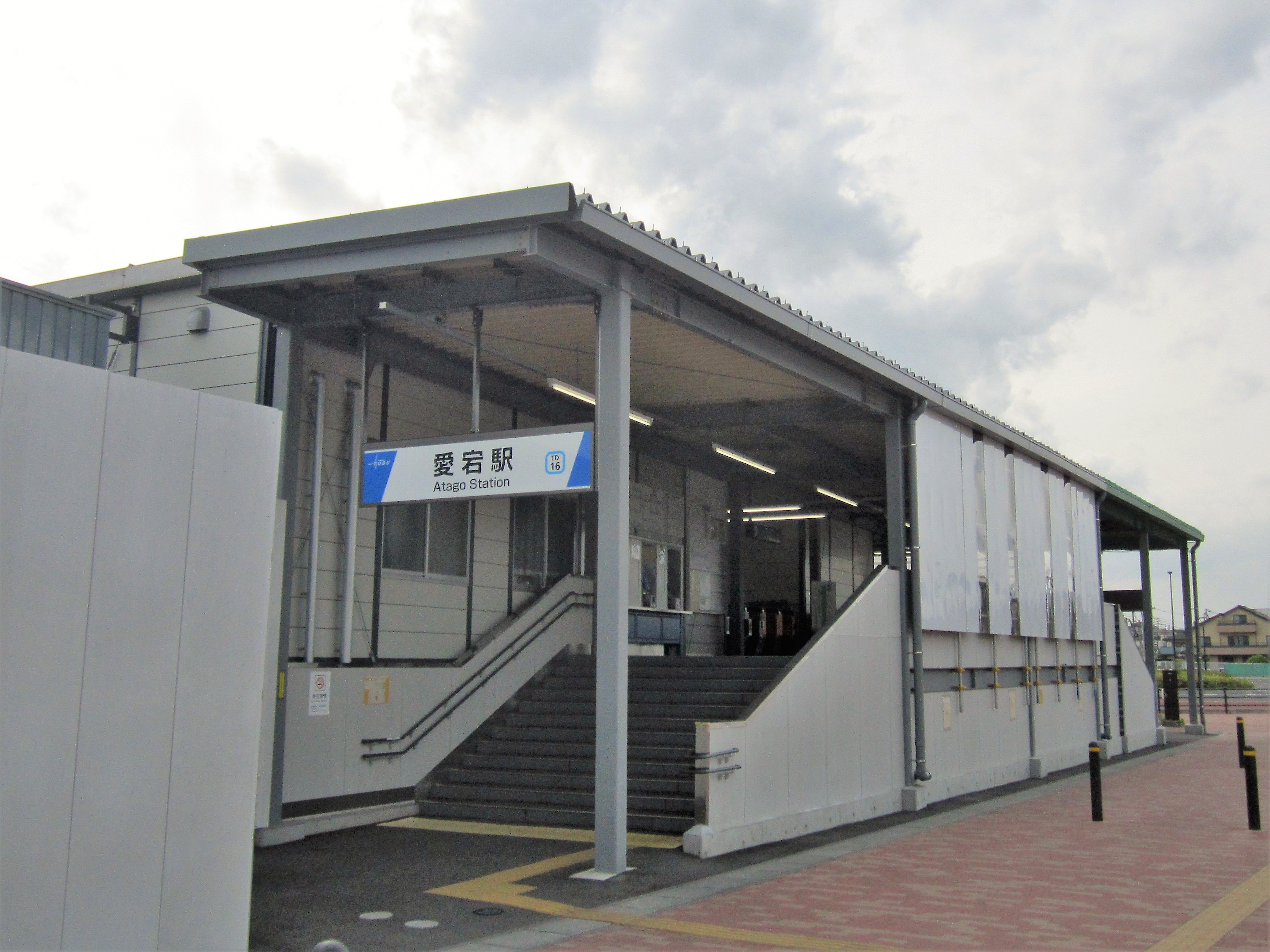 東武野田線愛宕駅の仮設駅舎 Canon PowerShot A2200